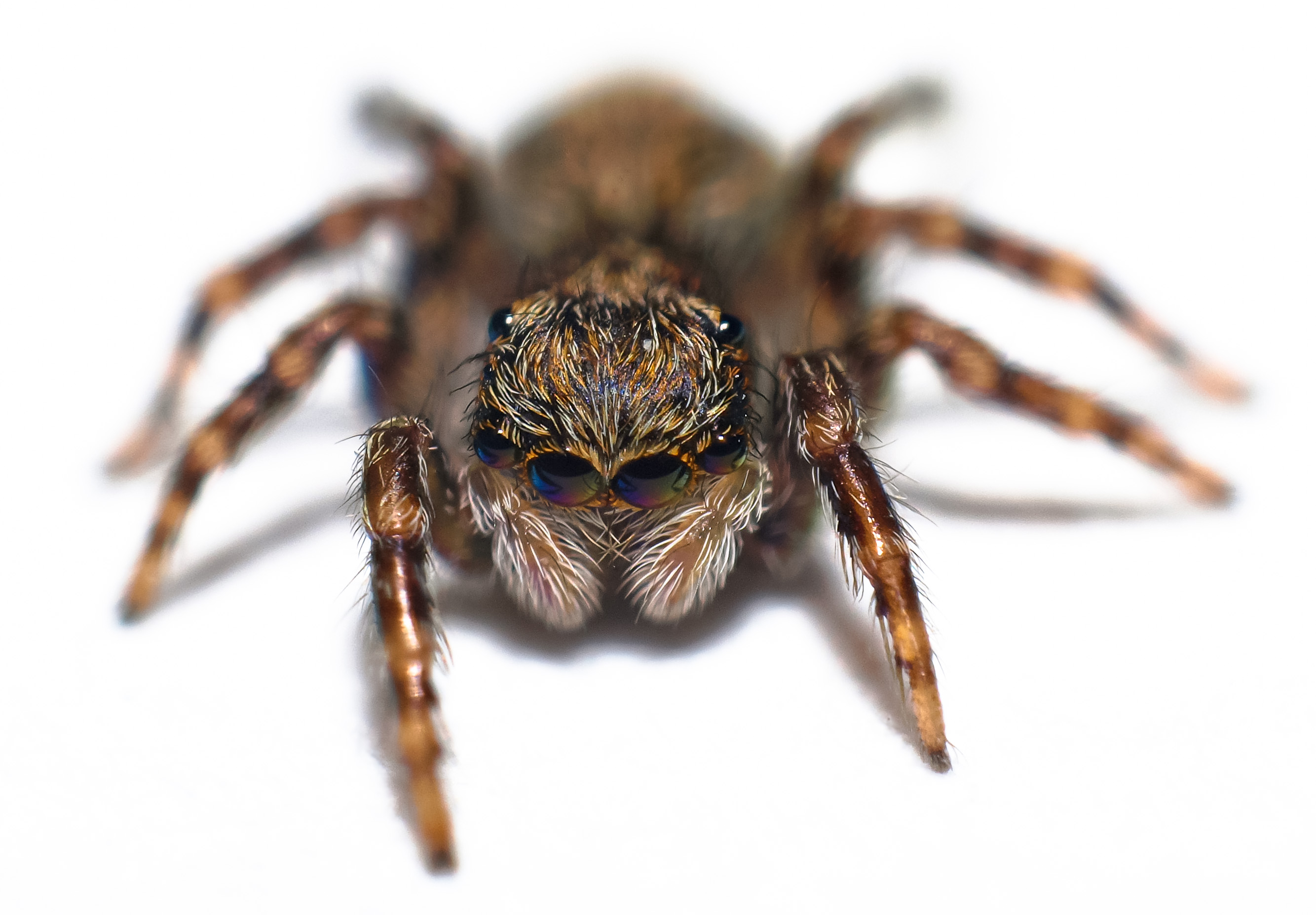 Pseudeuophrys lanigera, ca. 3,5 mm lang